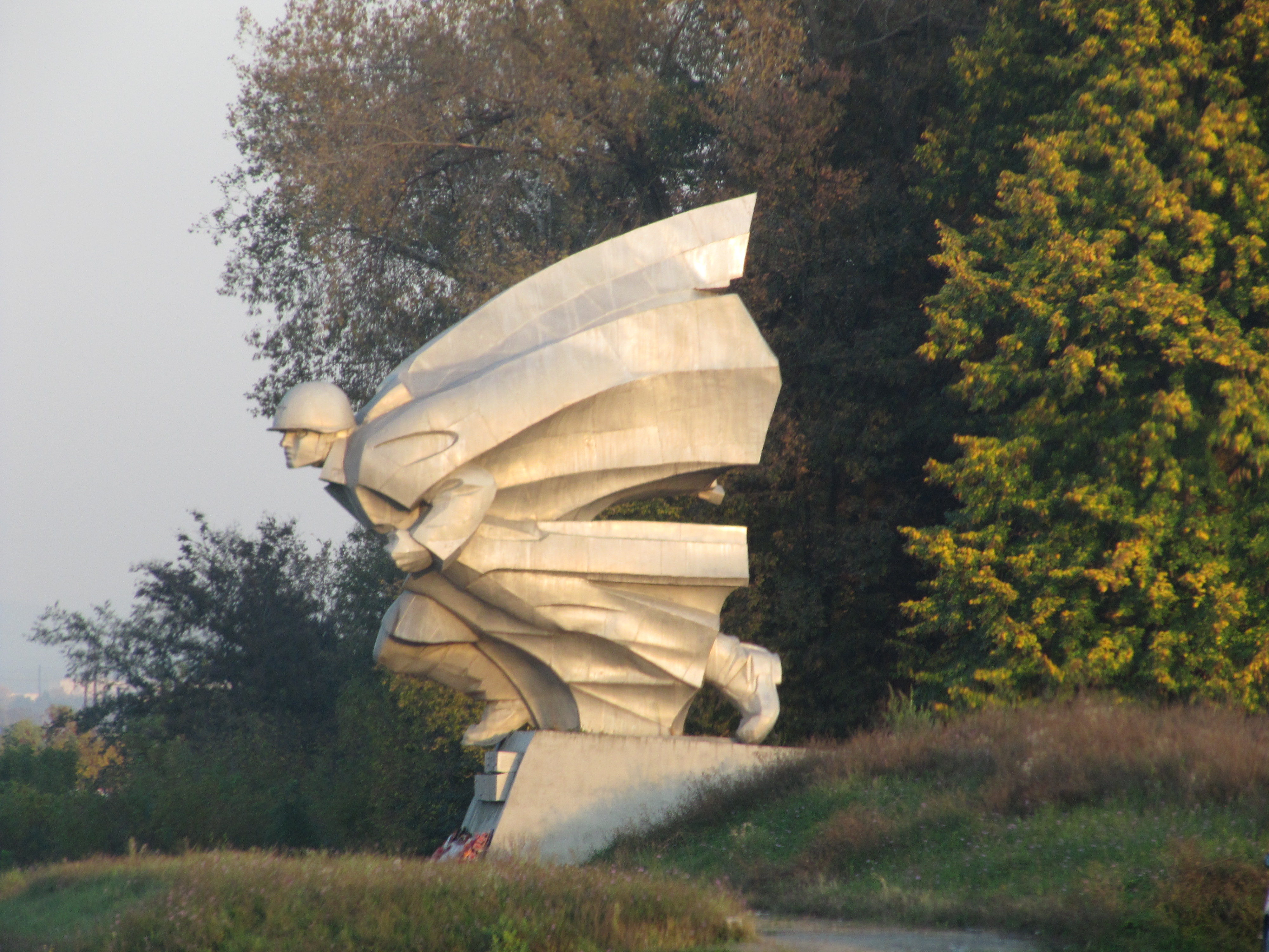 Памятник герою Советского Союза Петру Парфёновичу Барбашёву, около Владикавказа, Северная Осетия